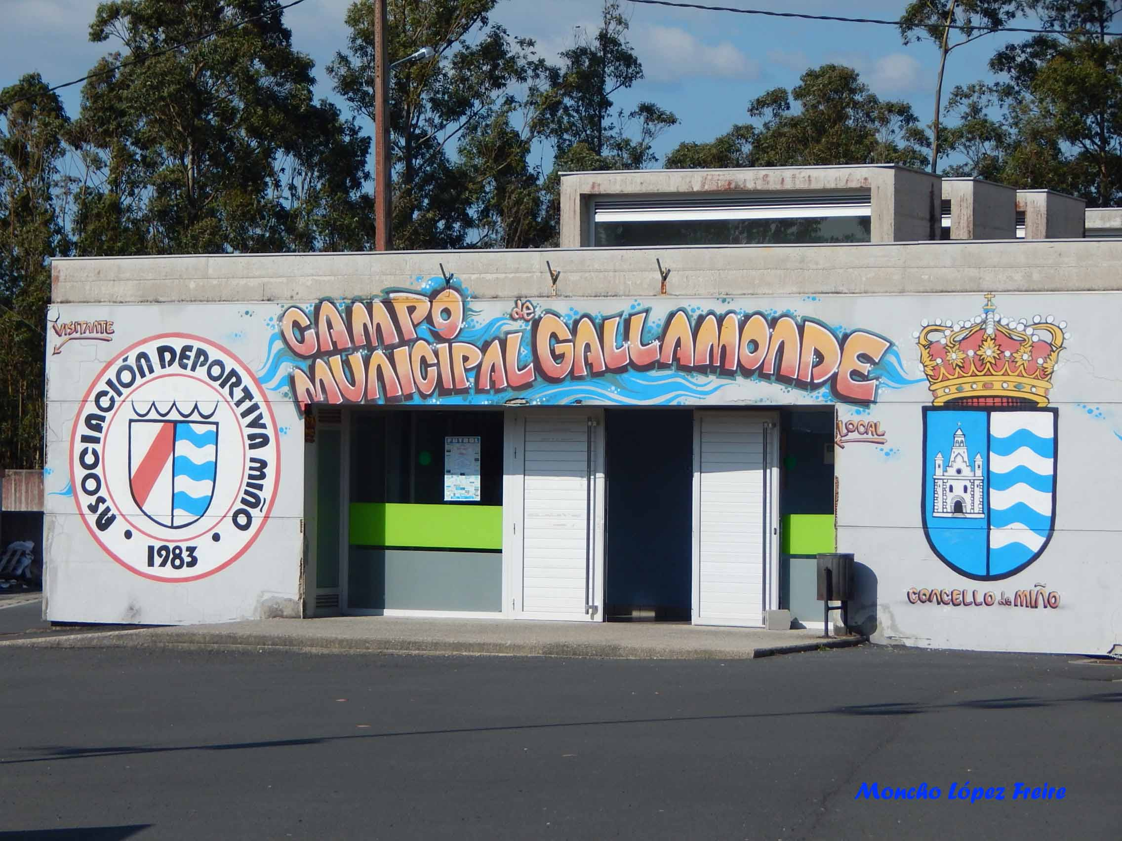 Campo Municipal de Fútbol de Gallamonde 2018 Miño